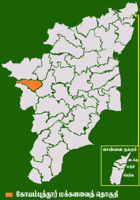 தமிழக வரைபடத்தில் உள்ள கோயம்புத்தூர் மக்களவைத் தொகுதி